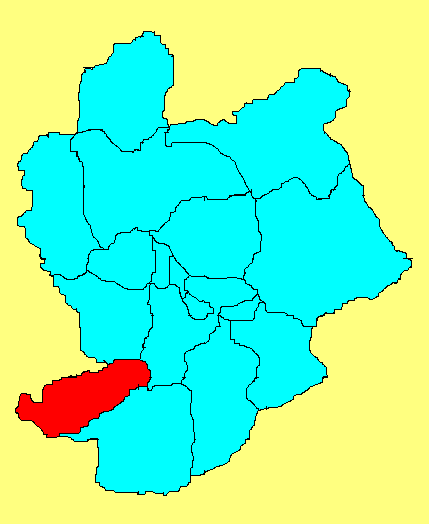 Yangyuan County.